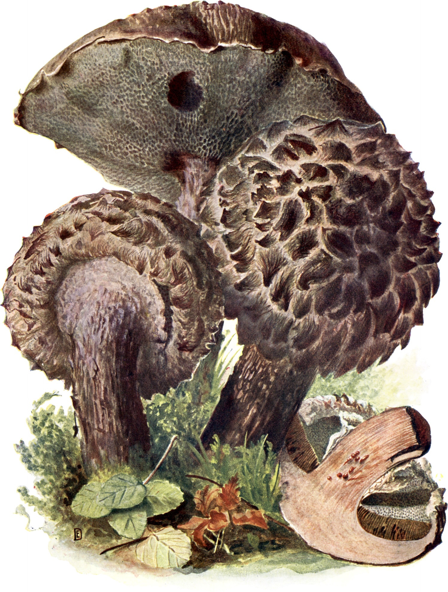 Schwarzer Schuppenröhrling; Strobilomyces strobilaceus. Genießbar.